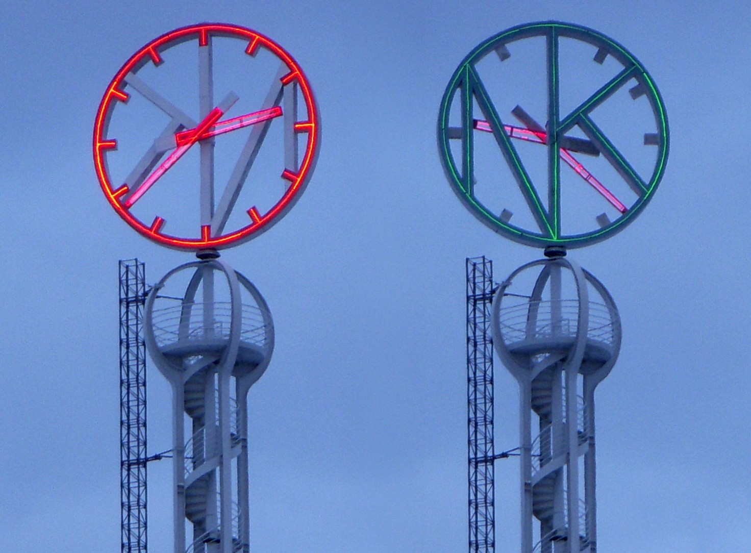 NK-klockan i Stockholm, båda sidor hopkopierade